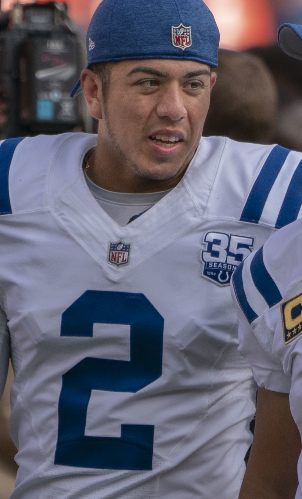 Colts at Redskins 09/16/18